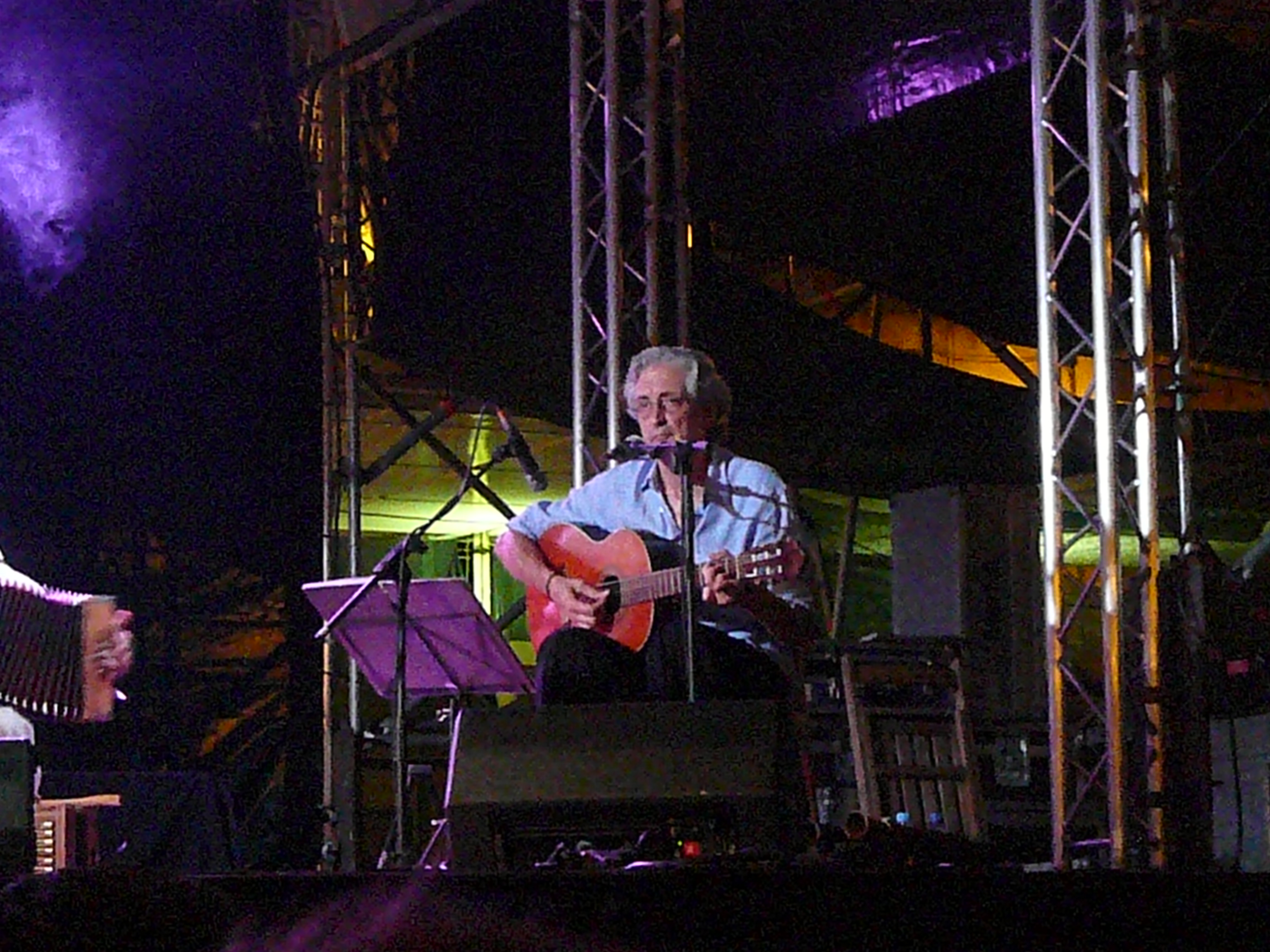 Concert d'El Pont d'Arcalís a la festa major de Gràcia del 2009, suposo que a la plaça del Sol.